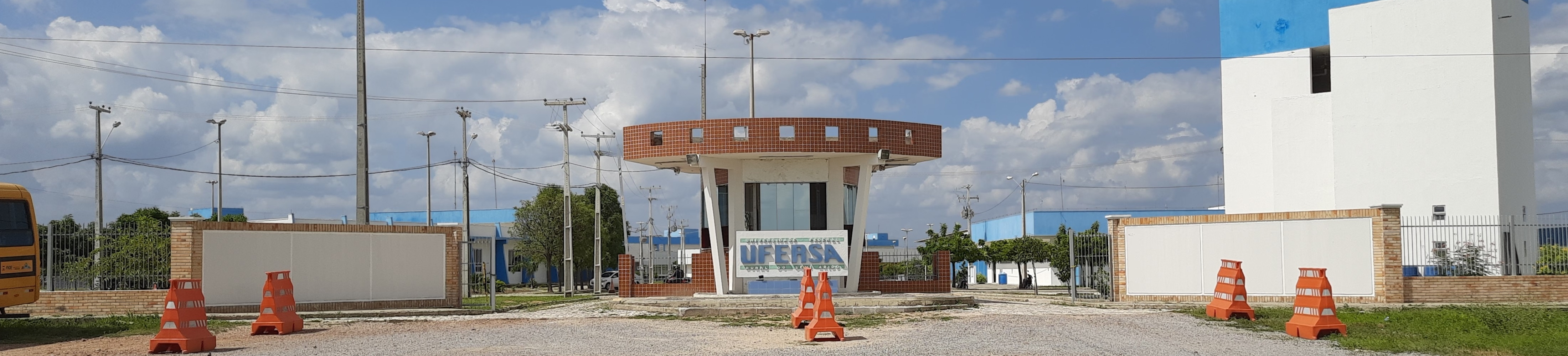 Câmpus da Universidade Federal Rural do Semiárido (UFERSA) em Pau dos Ferros, Rio Grande do Norte (Brasil), no bairro São Geraldo.